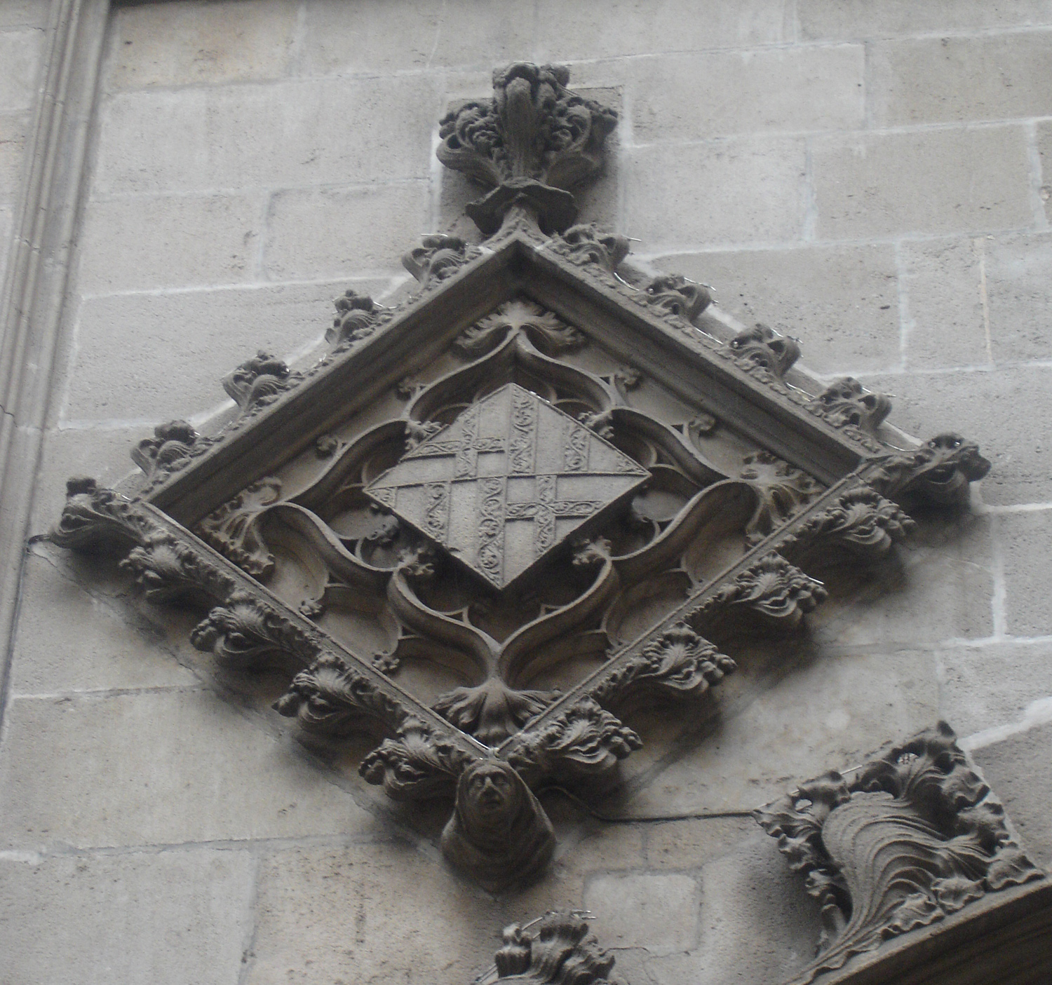 Façana antiga de l'ajuntament de Barcelona (Catalunya, Espanya) - Detall situat a la part superior dreta i esquerra de la porta dreta